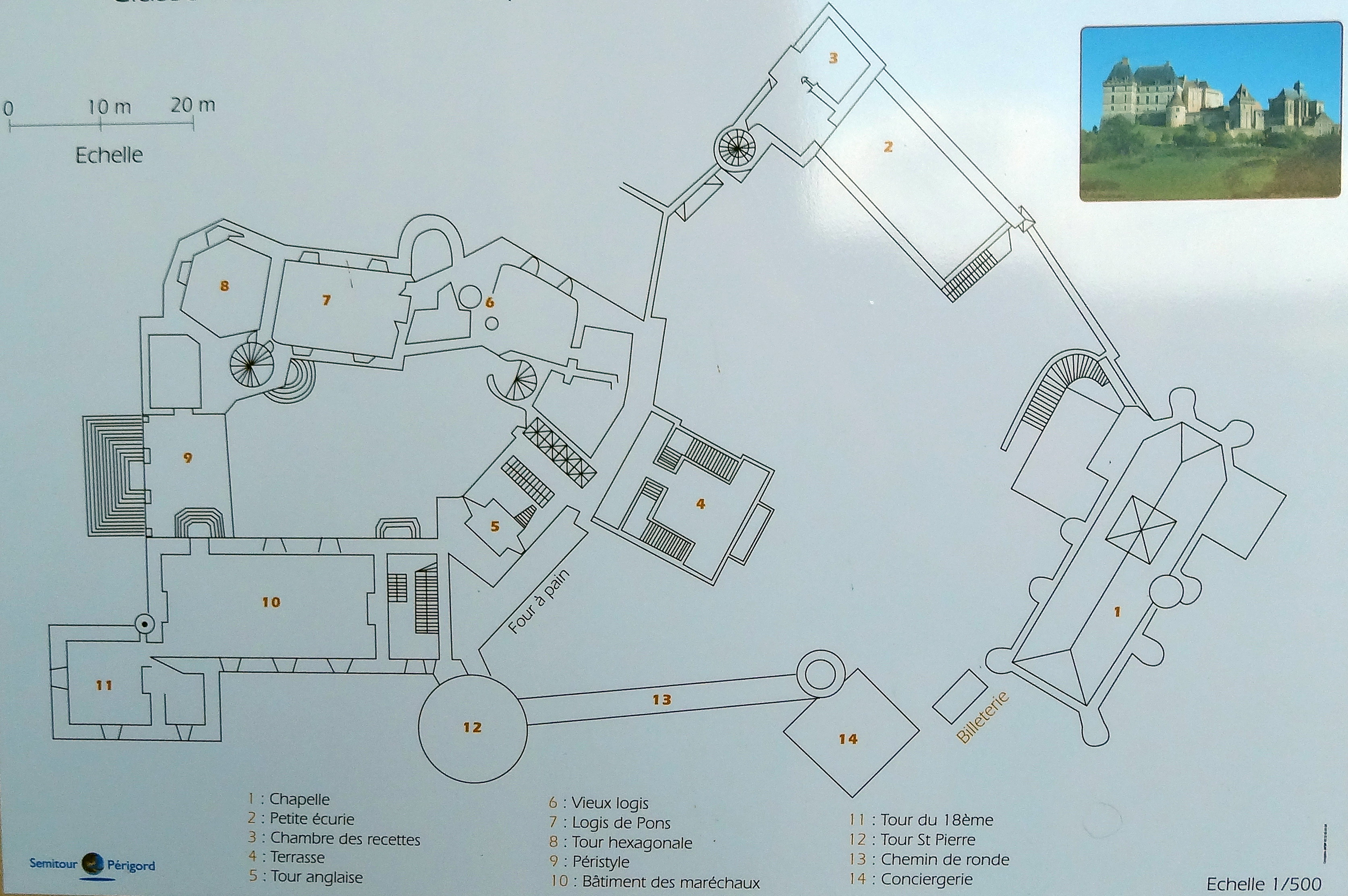 Plan du château de Biron (Dordogne)